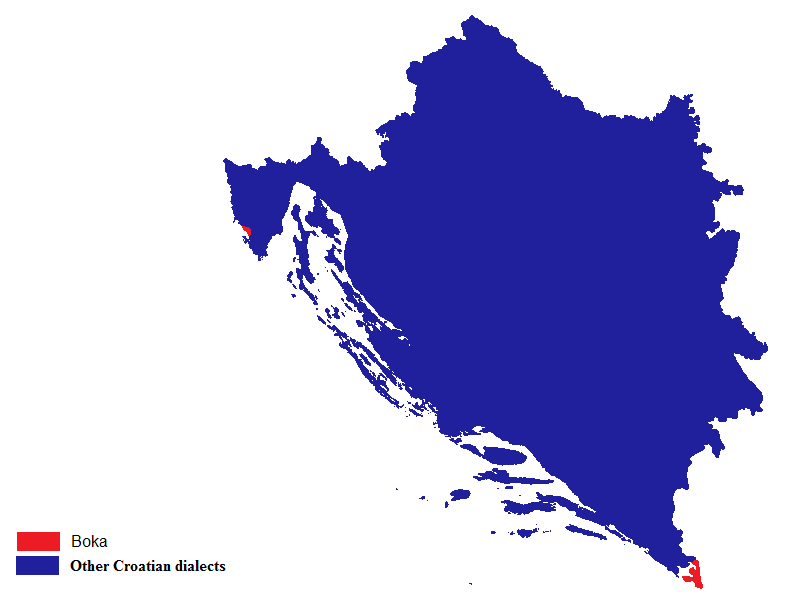 Bokeljsko-perojski dijalekt